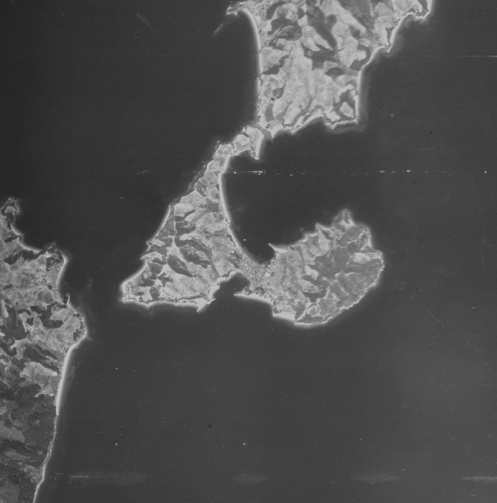 1947年の広島県呉市倉橋町鹿老渡